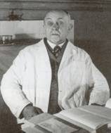 André Pol Bouin, plus communément appelé Pol Bouin, né le 11 juin 1870 à Vendresse dans les Ardennes et décédé le 5 février 1962 à Vendresse, était un biologiste, cytologiste et histologiste français